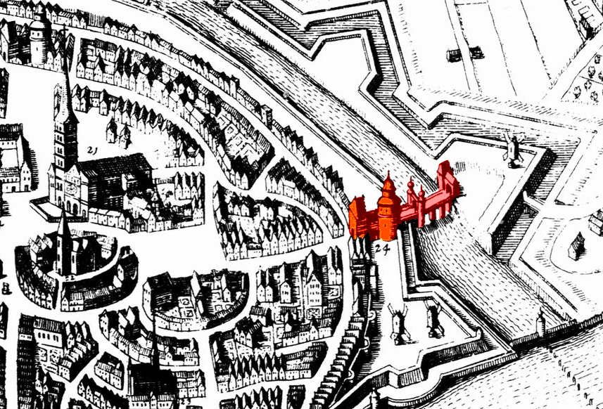 "Osterthor" 1640-41 - Brema von Matthäus Merian dem Älteren. Das Ostertor wurde farbig hervorgehoben